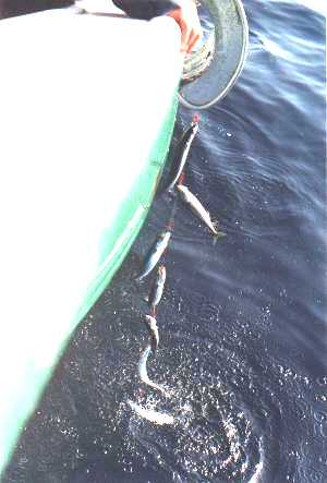 Pesca del verdel mediante aparejo de anzuelos por el barco de Ondarroa, Vizcaya, País Vaco, (España) Eguzki ederra.